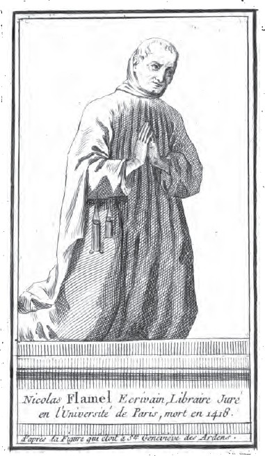 Nicolas Flamel - gravure d'après la figure qui était à Sainte Geneviève des Ardens